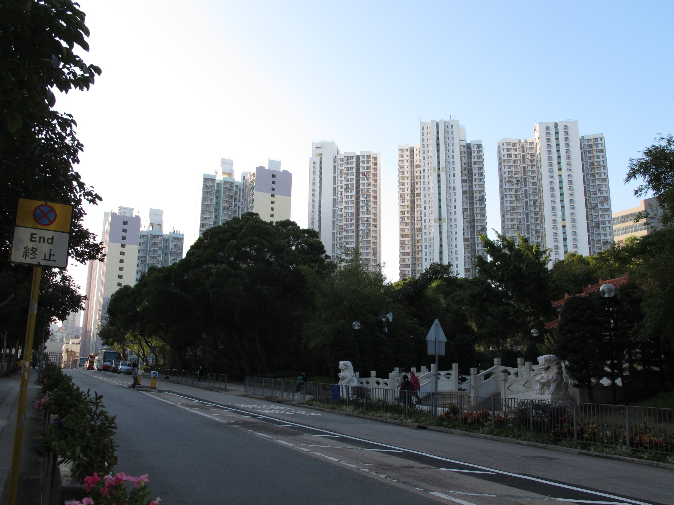 Hung Hom Estate